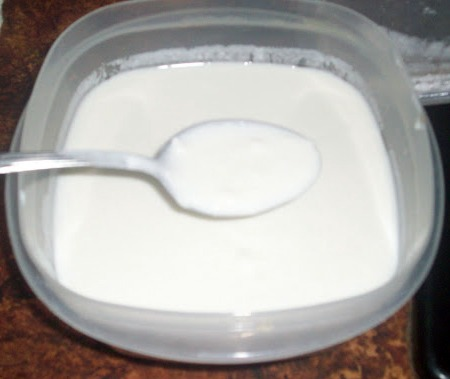 Leche Agria hecha en casa